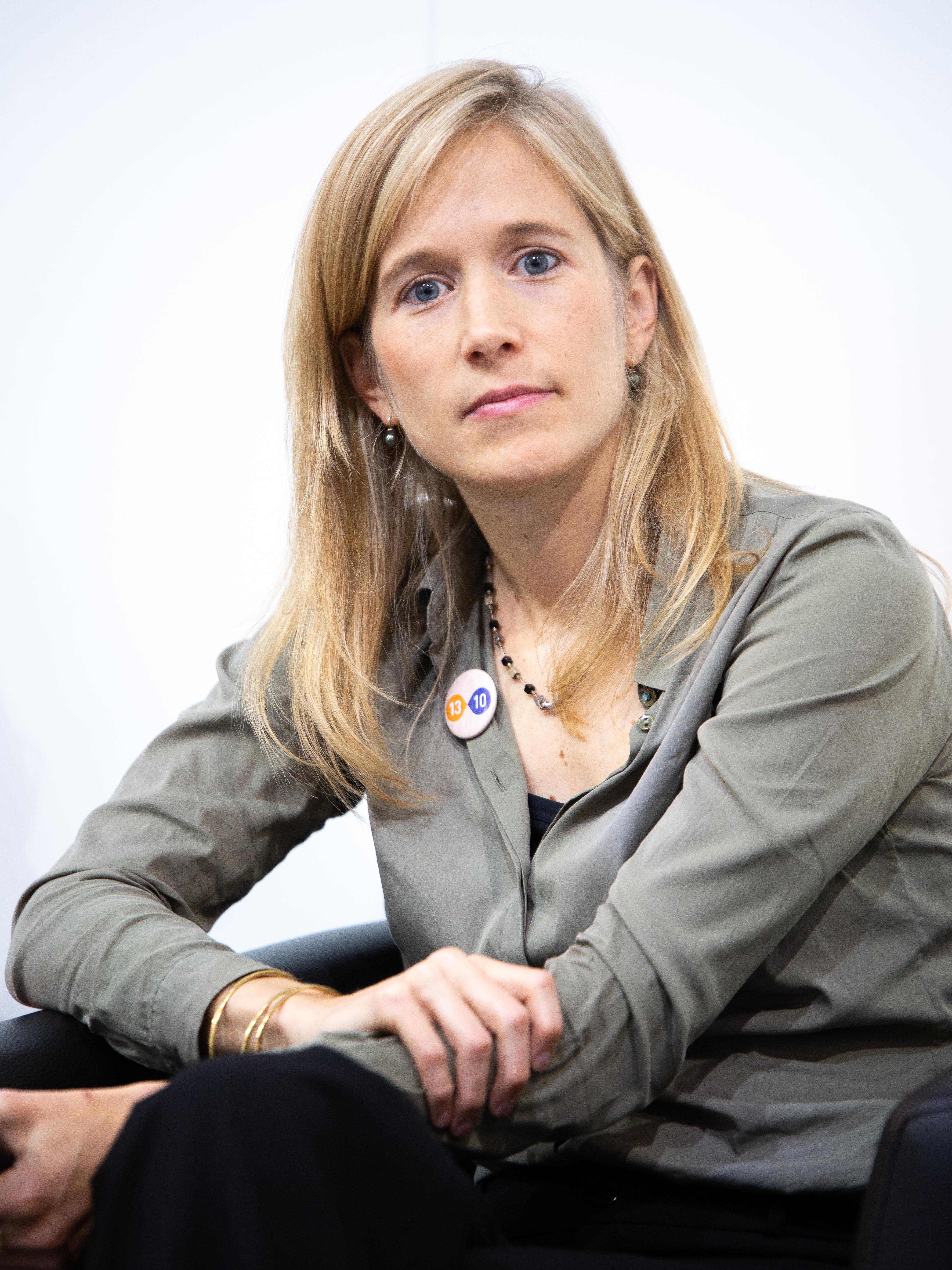 Hannah Dübgen auf der Frankfurter Buchmesse 2018